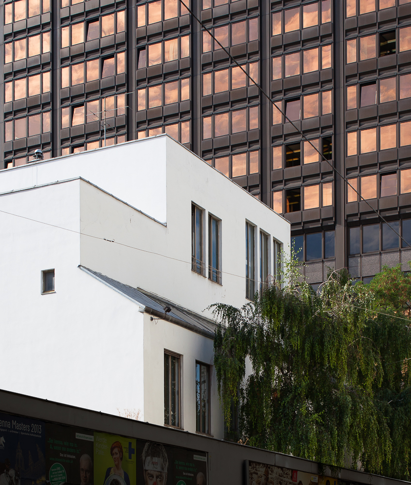 Haus Stonborough-Wittgenstein,1926 -1928, erbaut von Haus Stonborough-Wittgenstein